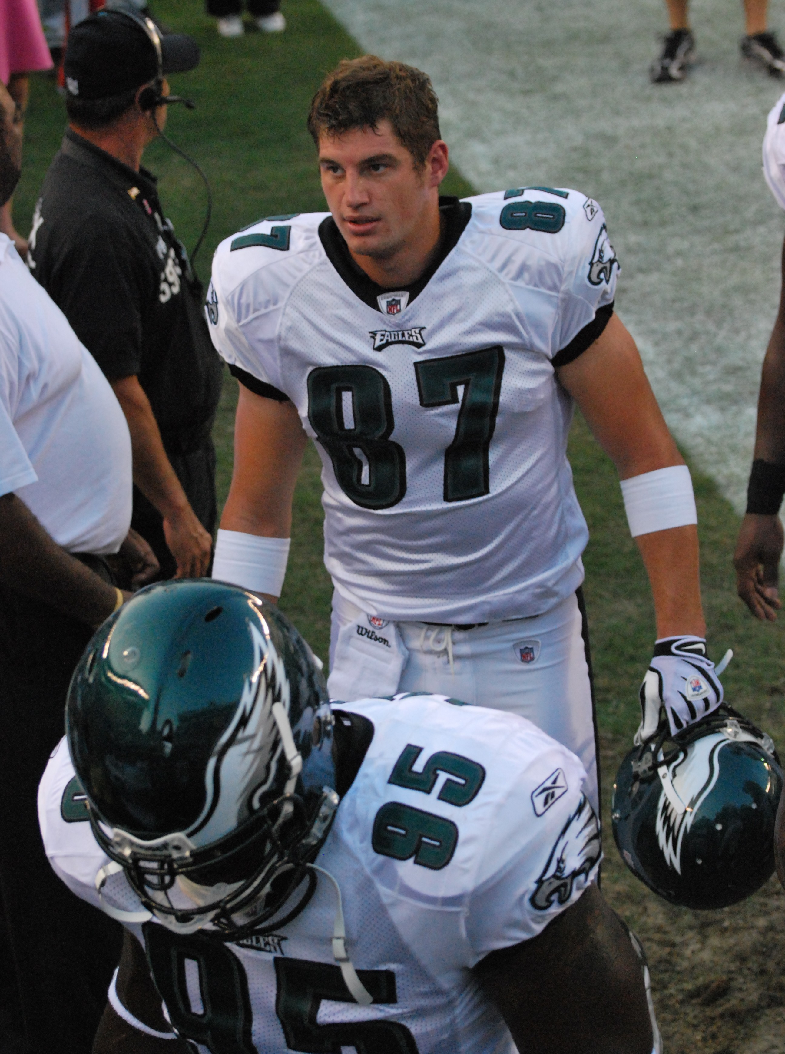 Brent Celek in August 2009